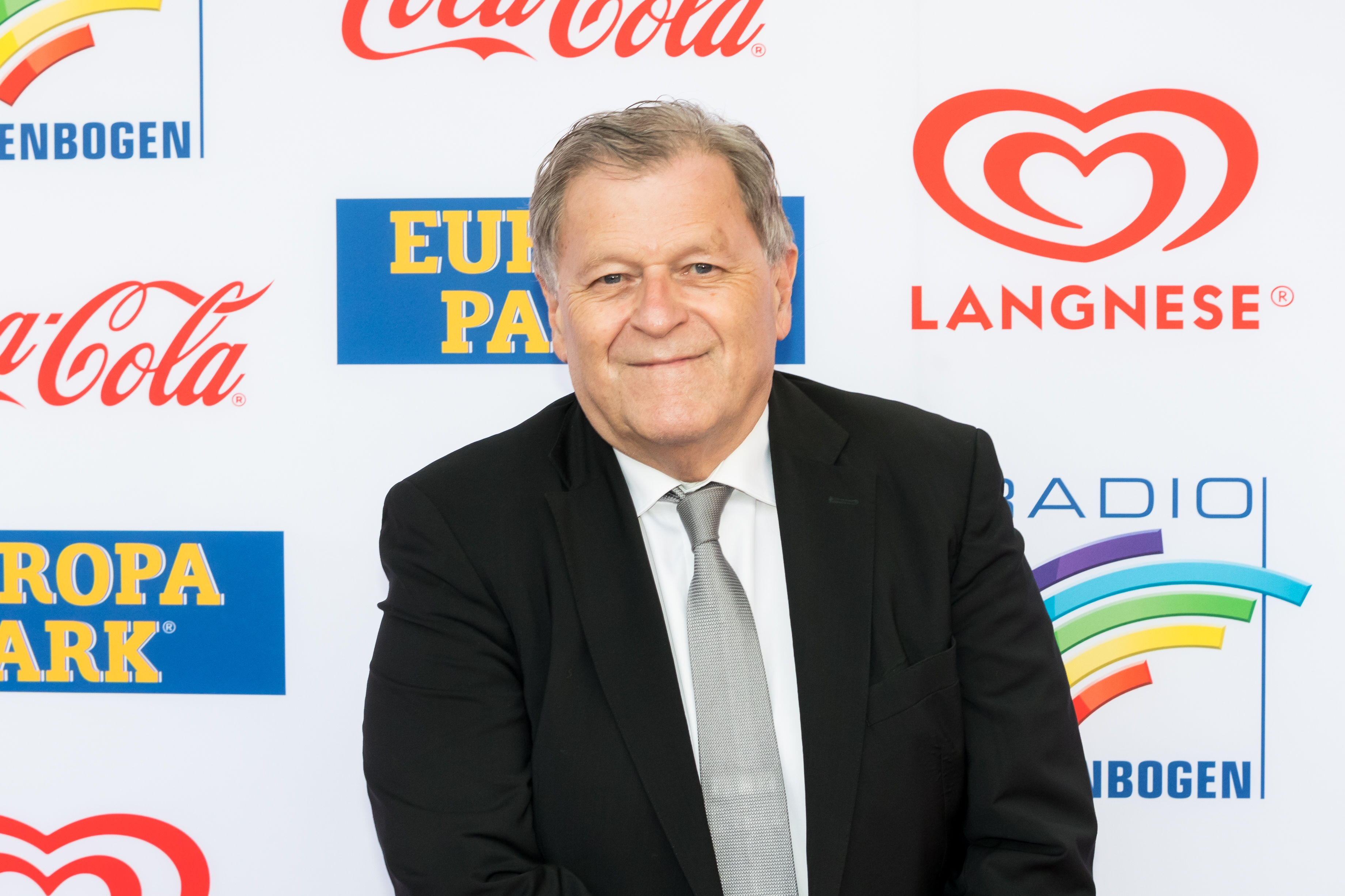 Norbert Haug during Radio Regenbogen Award 2019 at Europapark, Rust, Baden-Württemberg, Germany on 2019-04-12, Photo: Sven Mandel